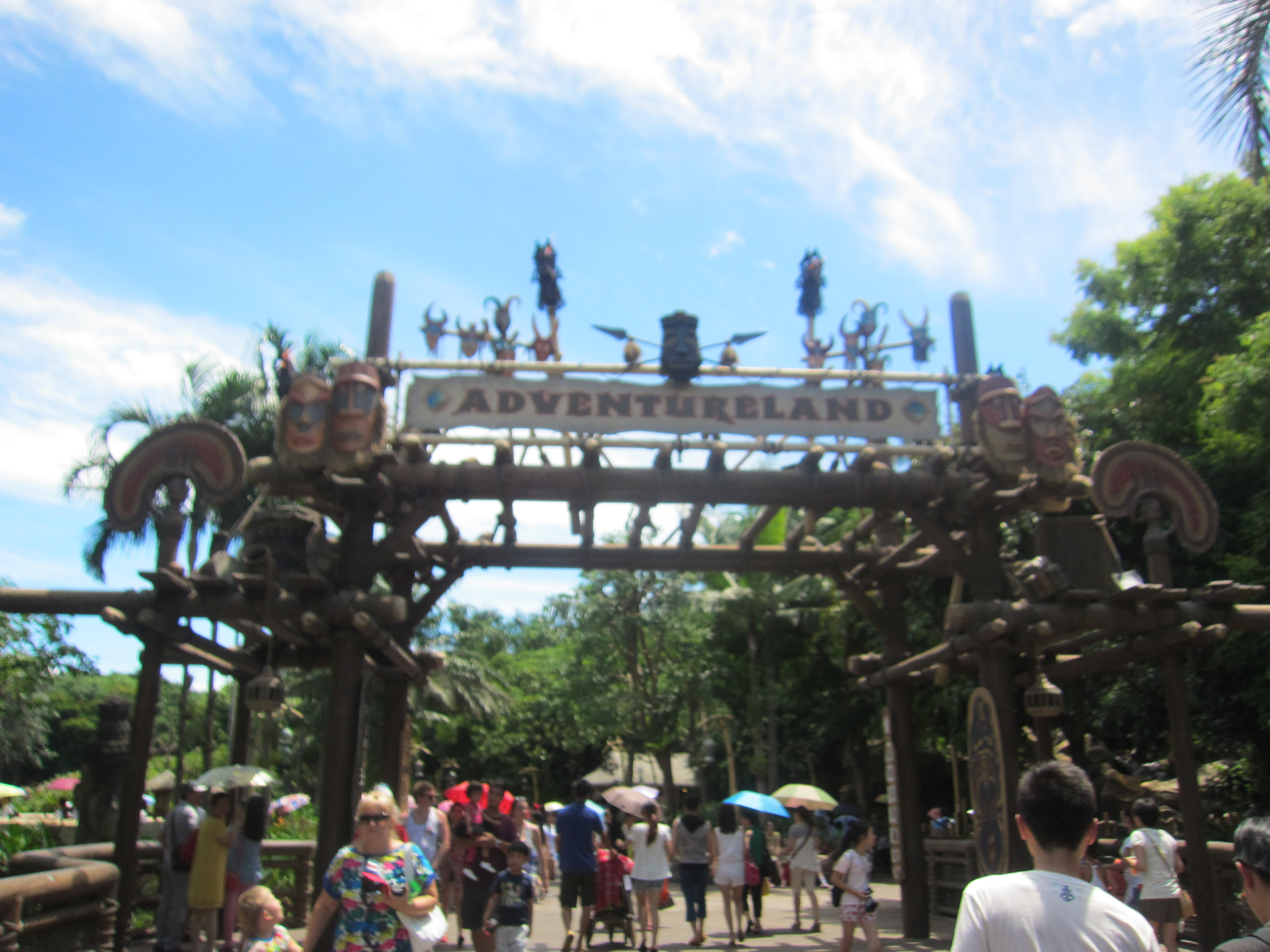 דיסנילנד (הונג קונג)